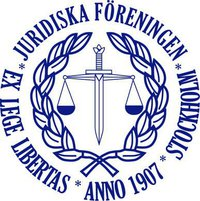 Juridiska föreningen vid Stockholms universitets vapen